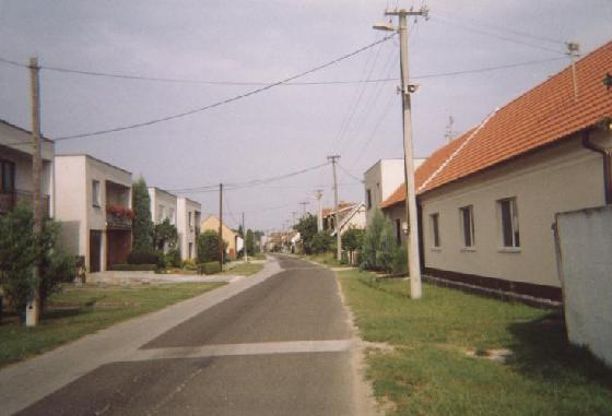 Brodské village, Slovakia